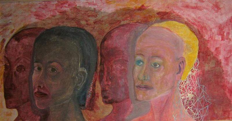 4-Schatten-und-2-Spiegelbilder, Öl auf Leinwand,126 x 66